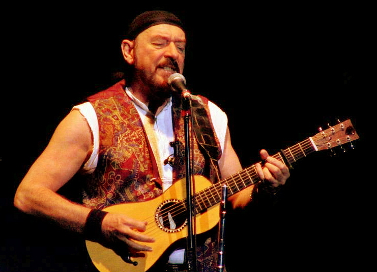 Gemaakt op 5 mei in het Teatro Nazionale, Milaan, Italië.